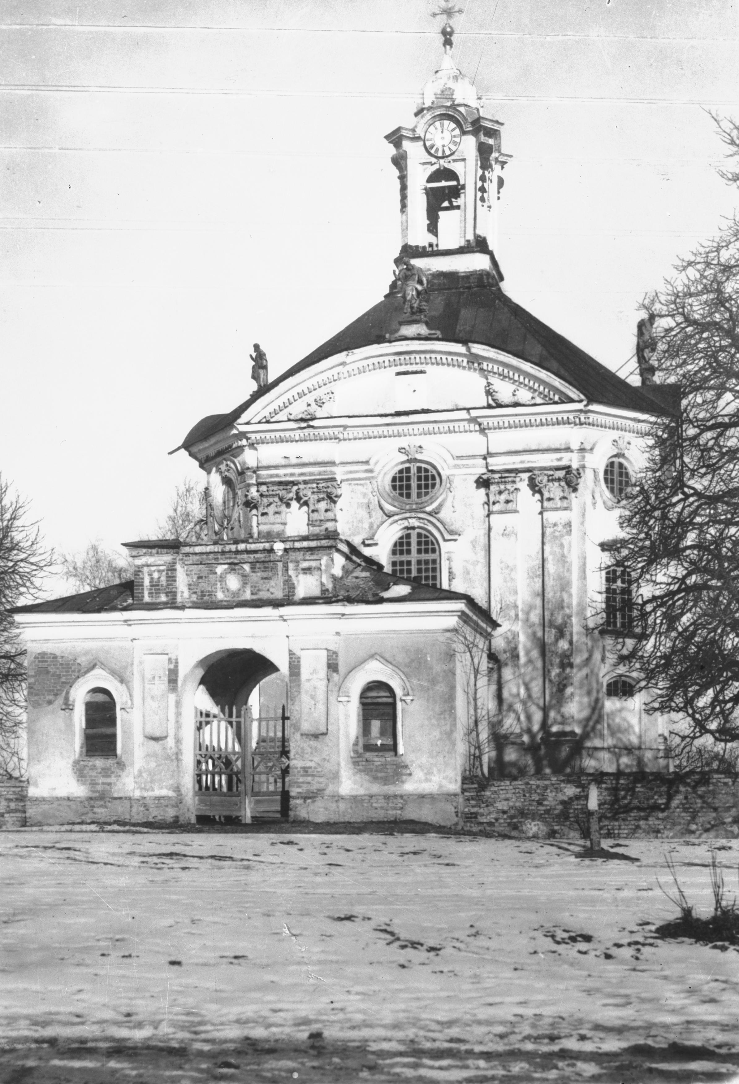 Беларуская (тарашкевіца): Воўчын (Воўчын). Касьцёл Найсьвяцейшай Тройцы